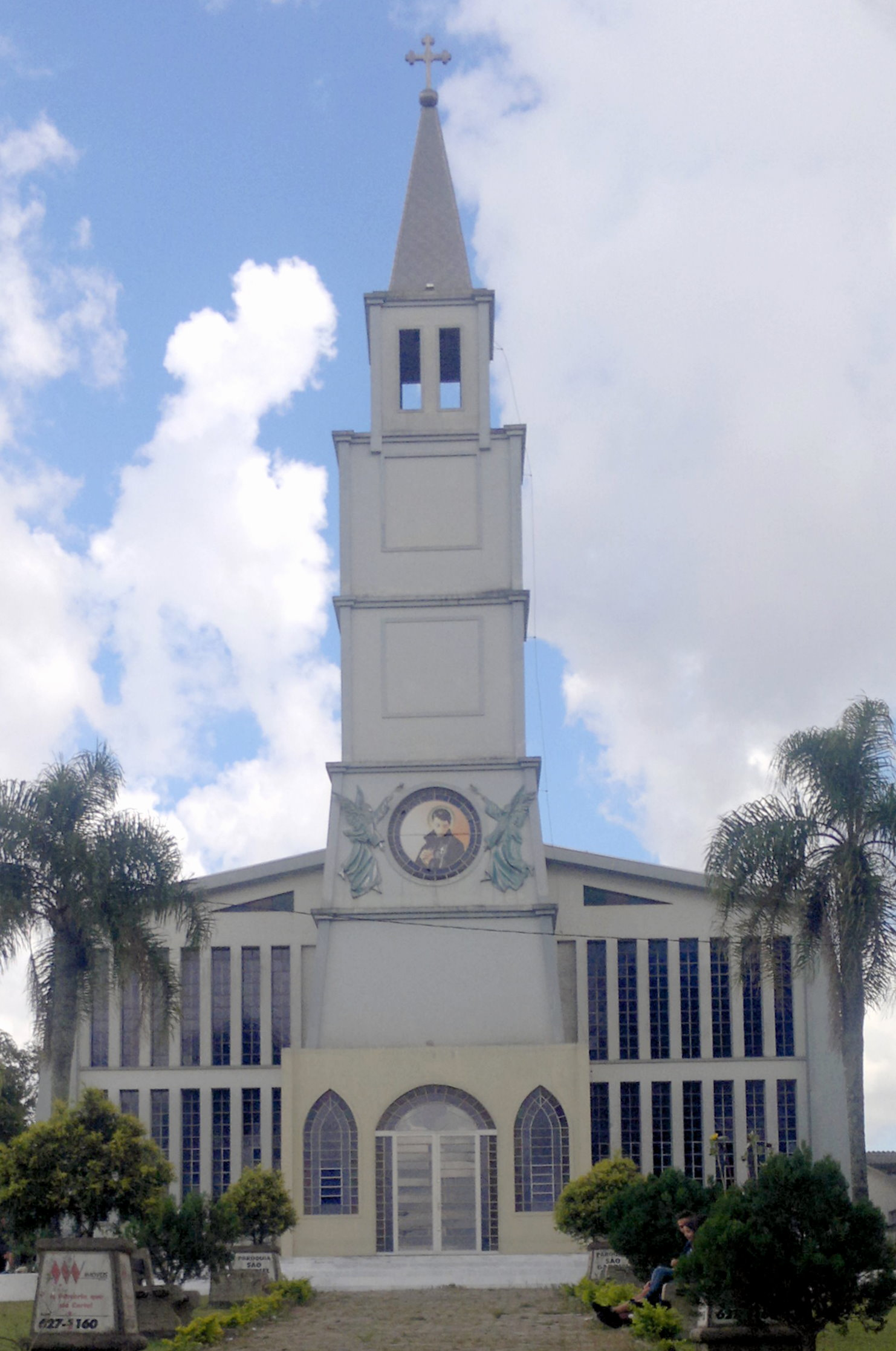 Igreja Matriz São Gabriel da Virgem Dolorosa de Fazenda Rio Grande (Grande Curitiba), Paraná, Sul do Brasil.